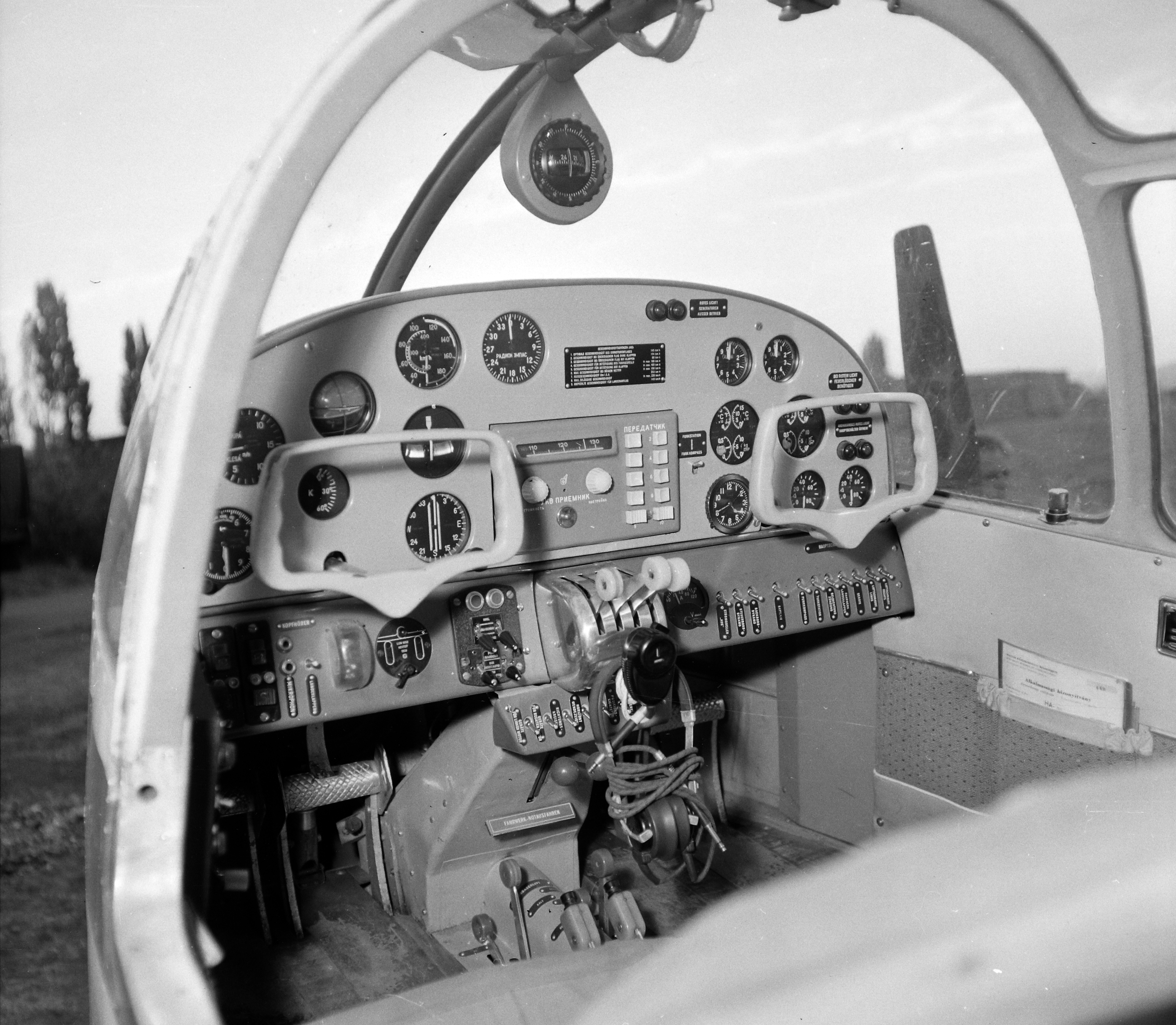 Where in Hungary?? Location: Hungary Tags: airplane, Czechoslovak brand, dashboard Title: A kép forrását kérjük így adja meg: Fortepan / Budapest Főváros Levéltára. Levéltári jelzet: HU.BFL.XV.19.c.10